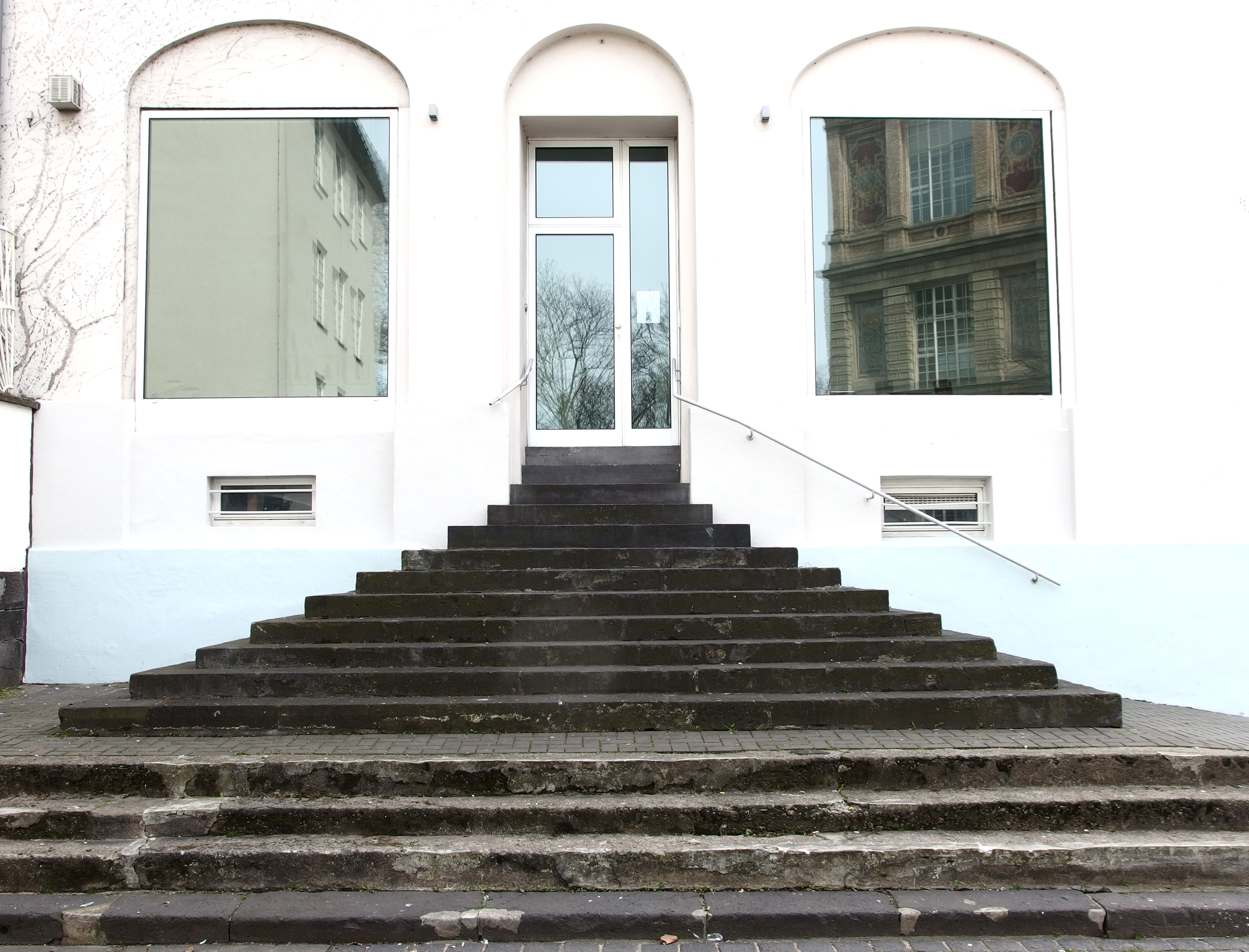 Haus Eiskellerberg 1-3, Treppe Aufgang zur Felix Ringel Galerie